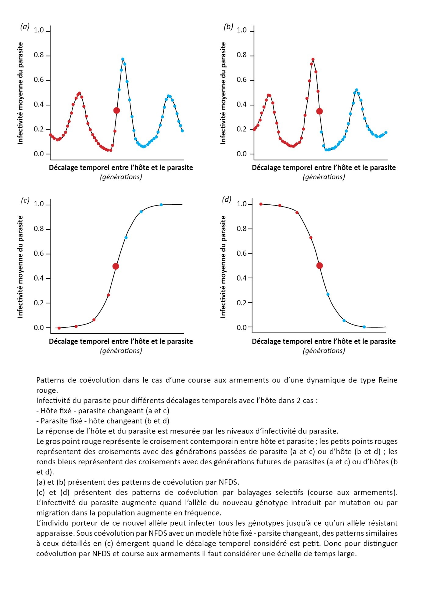 Adapté de Buckling et Rainey (2002)